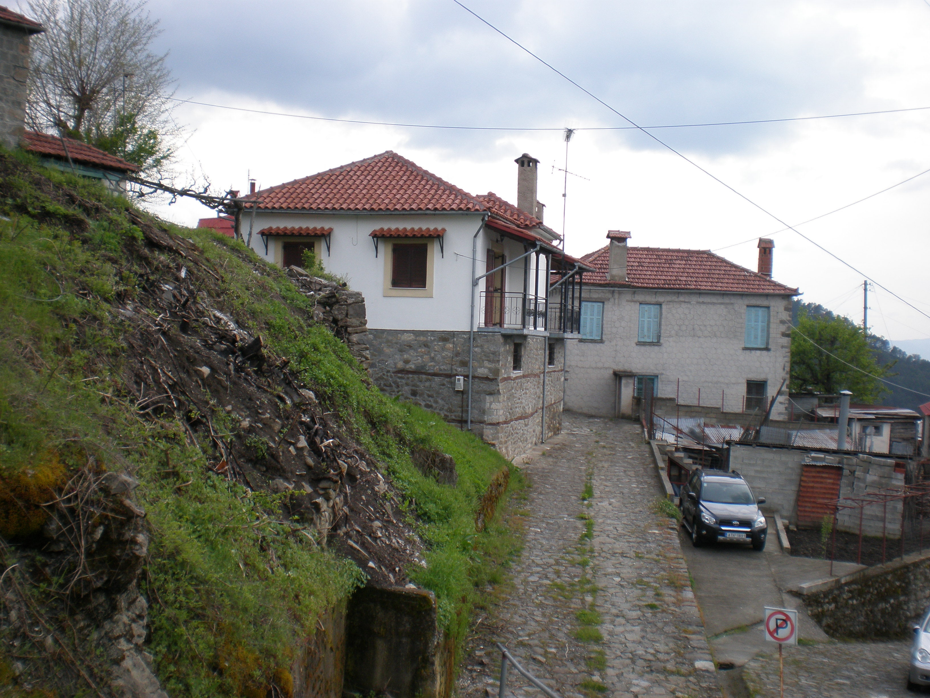 Σπίτι στο Μοναστήρι Κόνιτσας , όπως φαίνεται μπαίνοντας στο χωριό